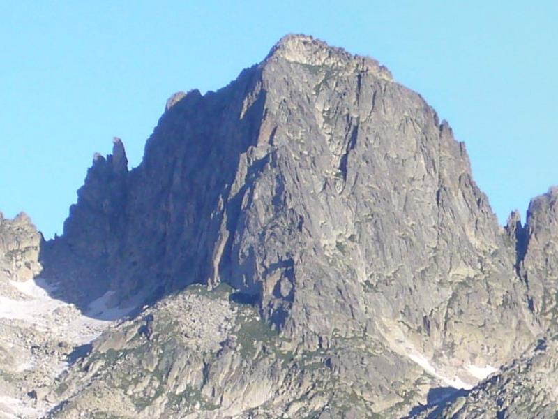 El Pa de Sucre vist des de la Vall de Colieto; la Vall de Boí, Alta Ribagorça, Catalunya